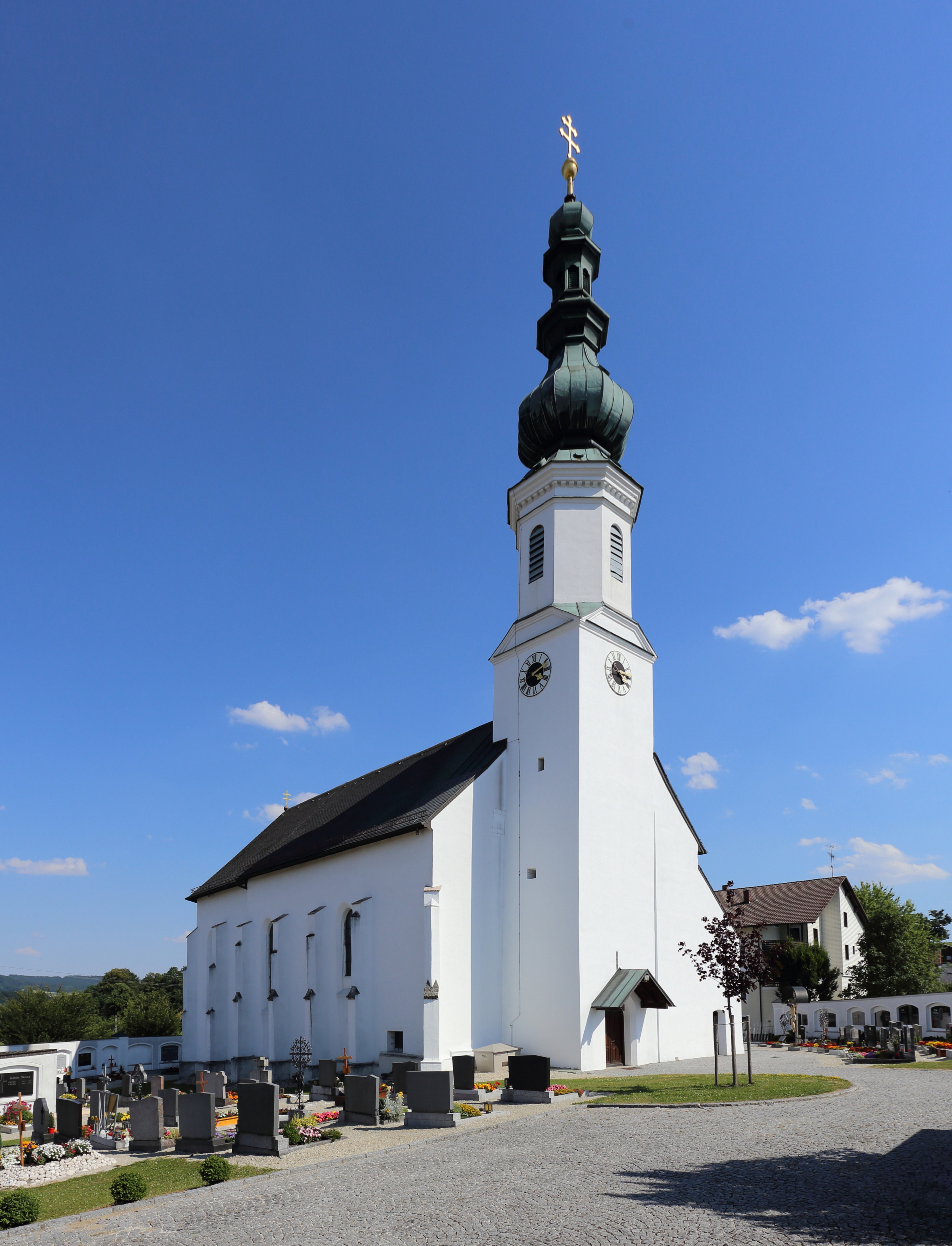 Katholische Pfarrkirche hl. Martin in der oberösterreichischen Gemeinde Schildorn. Ein gotisches Bauwerk, das 1812 flach gedeckt wurde. Der Hochaltar ist ein Werk um 1660 mit einem Altarbild von Franz Paul Lofferer aus dem Jahr 1793.